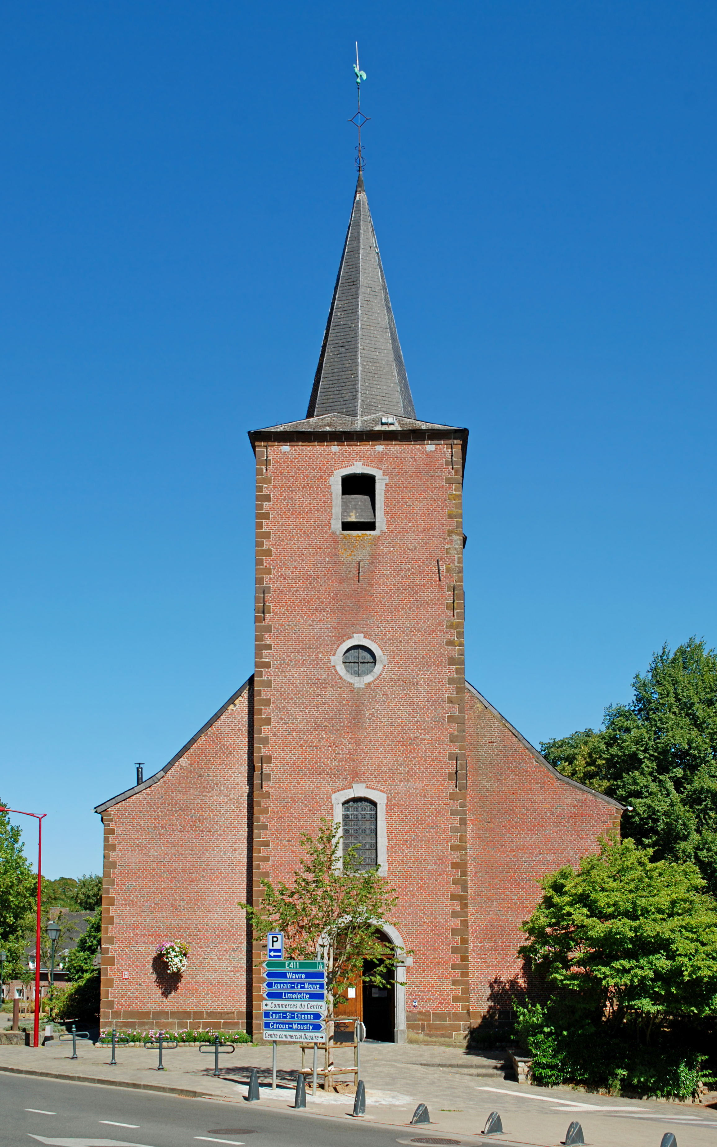 Belgique - Brabant wallon - Ottignies - Église Saint-Rémi This photo of immovable heritage has been taken in the Walloon Region